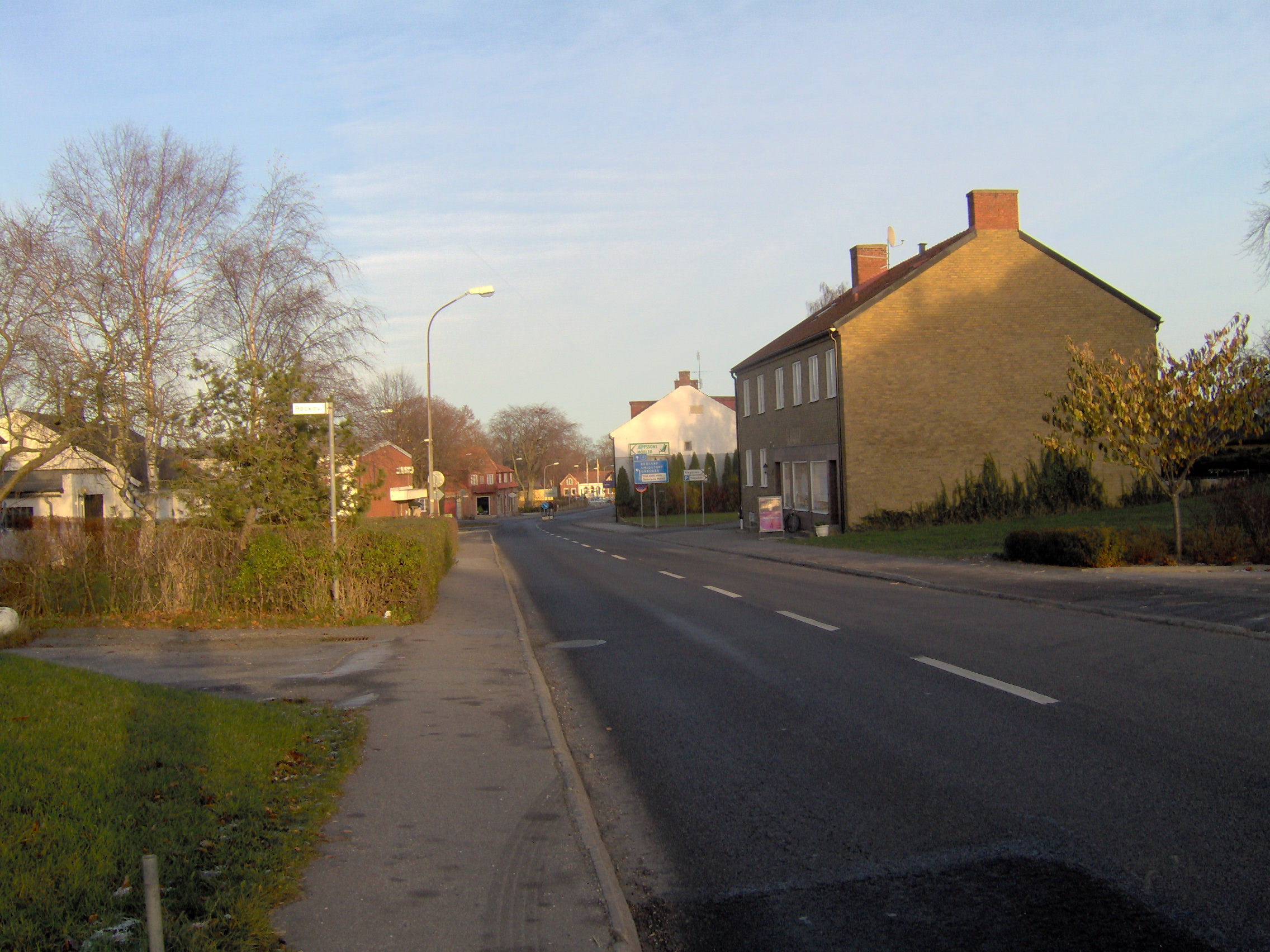 Storavägen genom Hammenhög. Foto: Sundström Kategori: Hammenhög